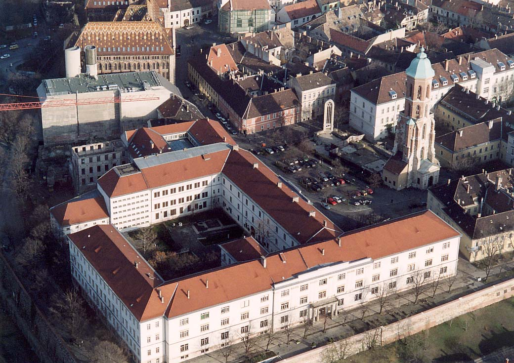 Buda Castles - Budapest - Hungary - Europe